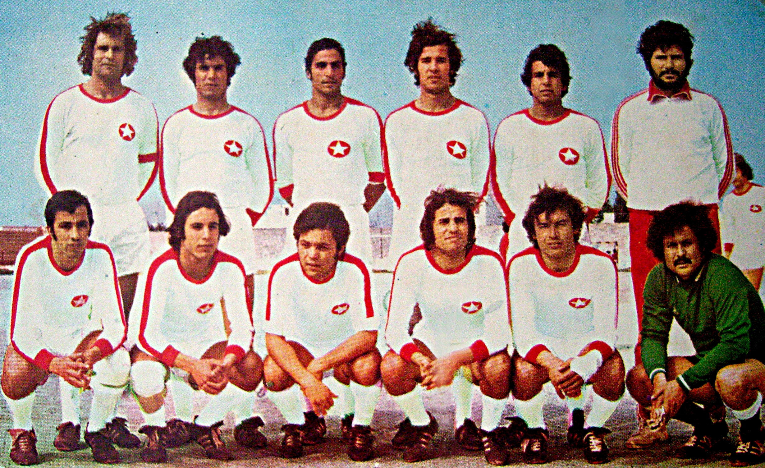 Carte postale montrant l'équipe de l'Étoile sportive du Sahel, championne du Maghreb de l'année 1973